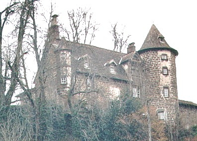 Chateau d'Oyez Saint-Simon (15)